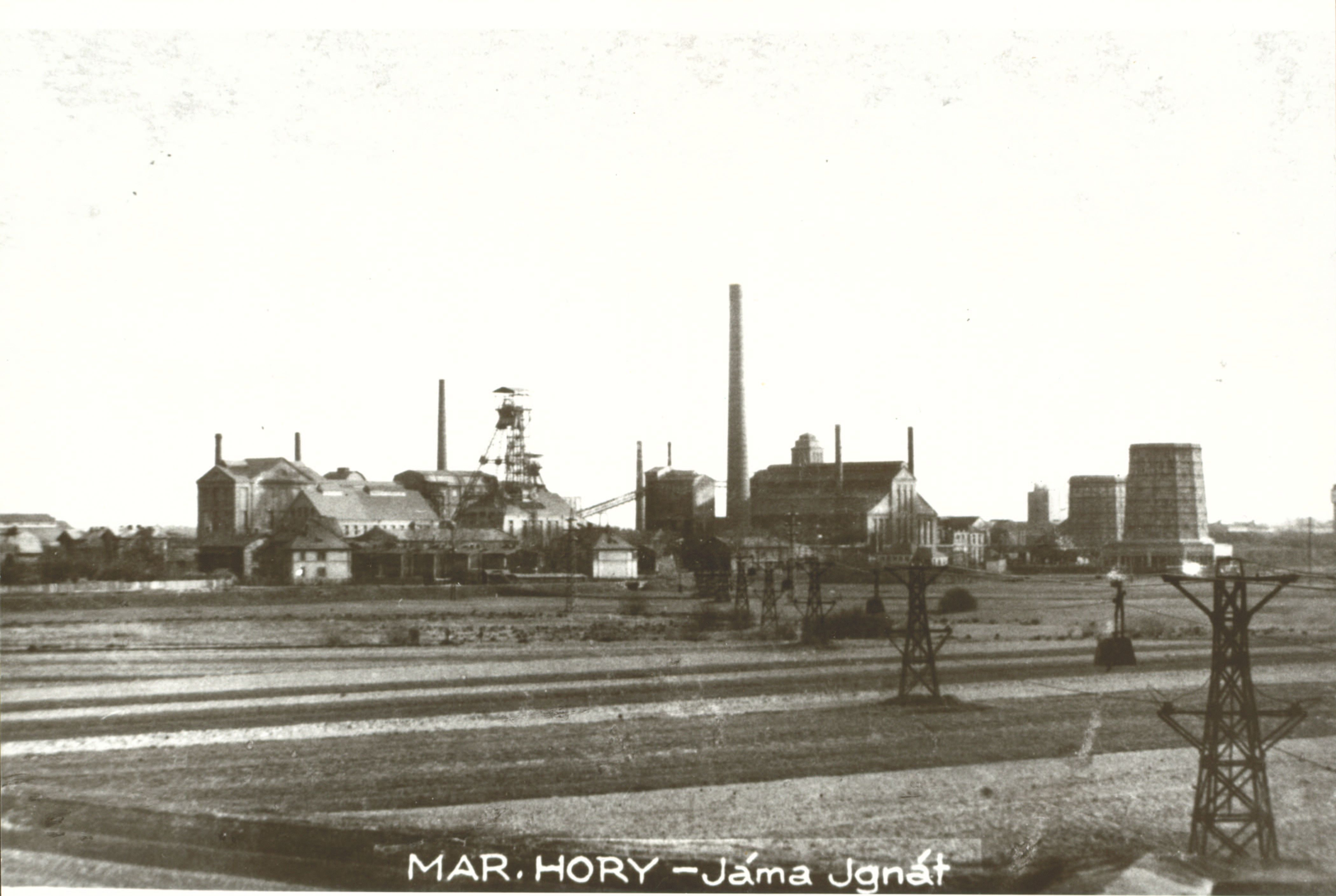 Jáma Ignát v Mariánských Horách.